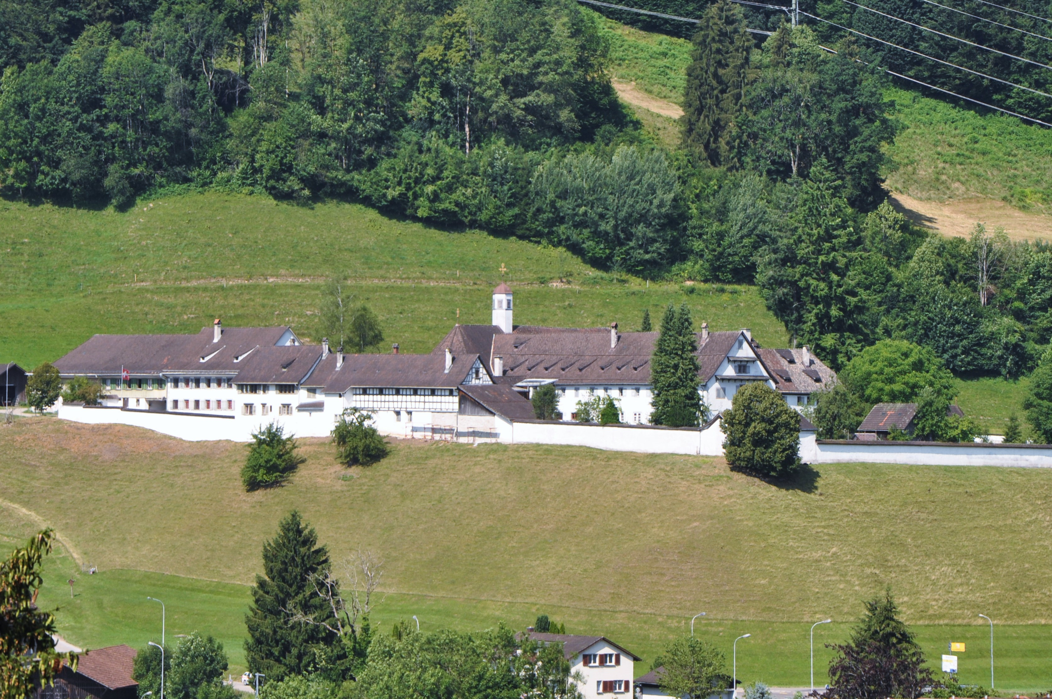 Kloster Wattwil mit Pachthof, Kirche, Konventgebäude und Klausurmauer